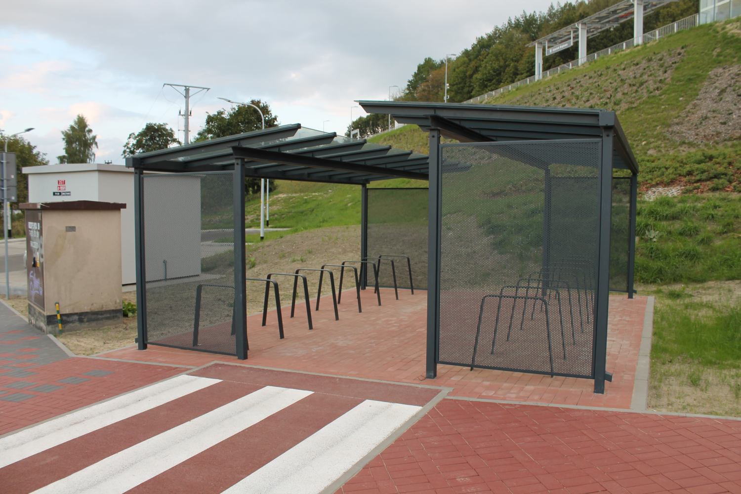 Parking Bike&Ride przy przystanku kolejowym Gdańsk Brętowo. The making of this document was supported by Wikimedia Polska Association, within Wikigrant no. WG 2015-34. English | polski | +/−